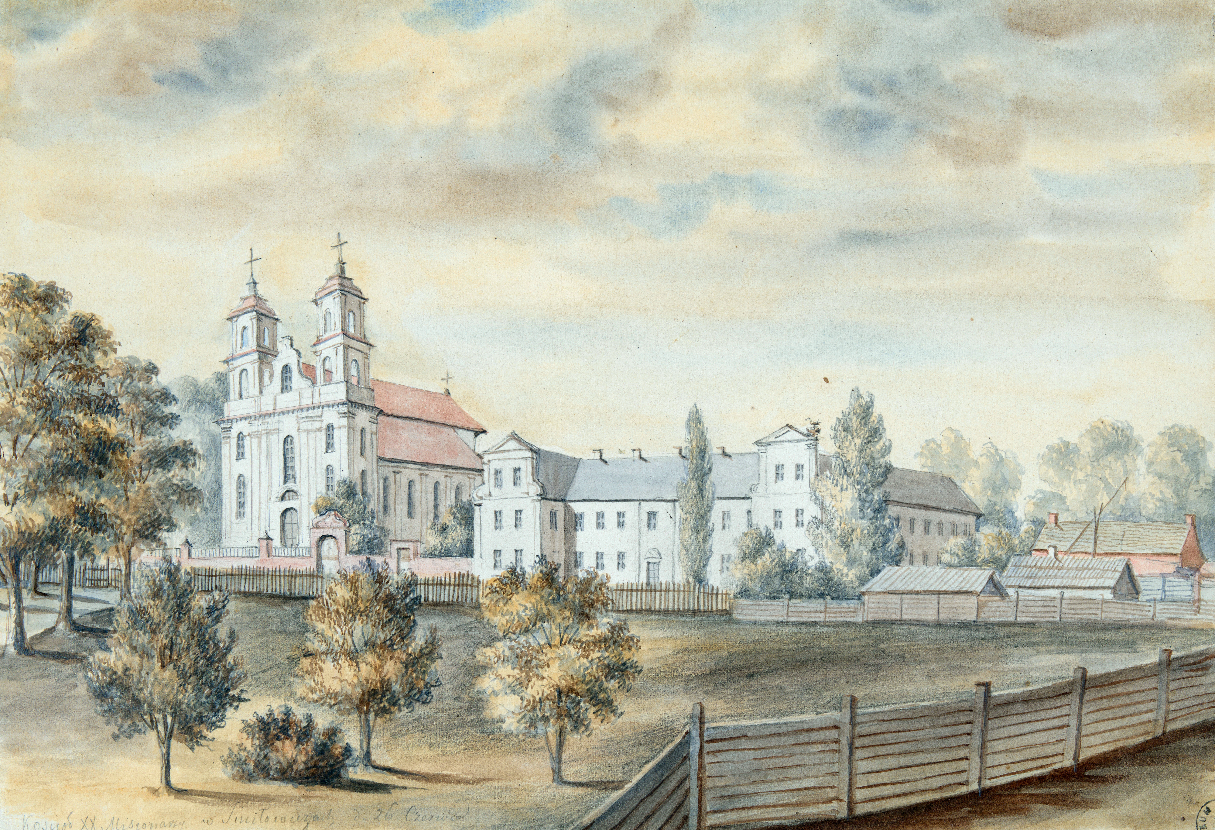 Беларуская (тарашкевіца): Сьмілавічы (Śmiłavičy). Касьцёл Сьвятога Вінцэнта і кляштар місіянэраў